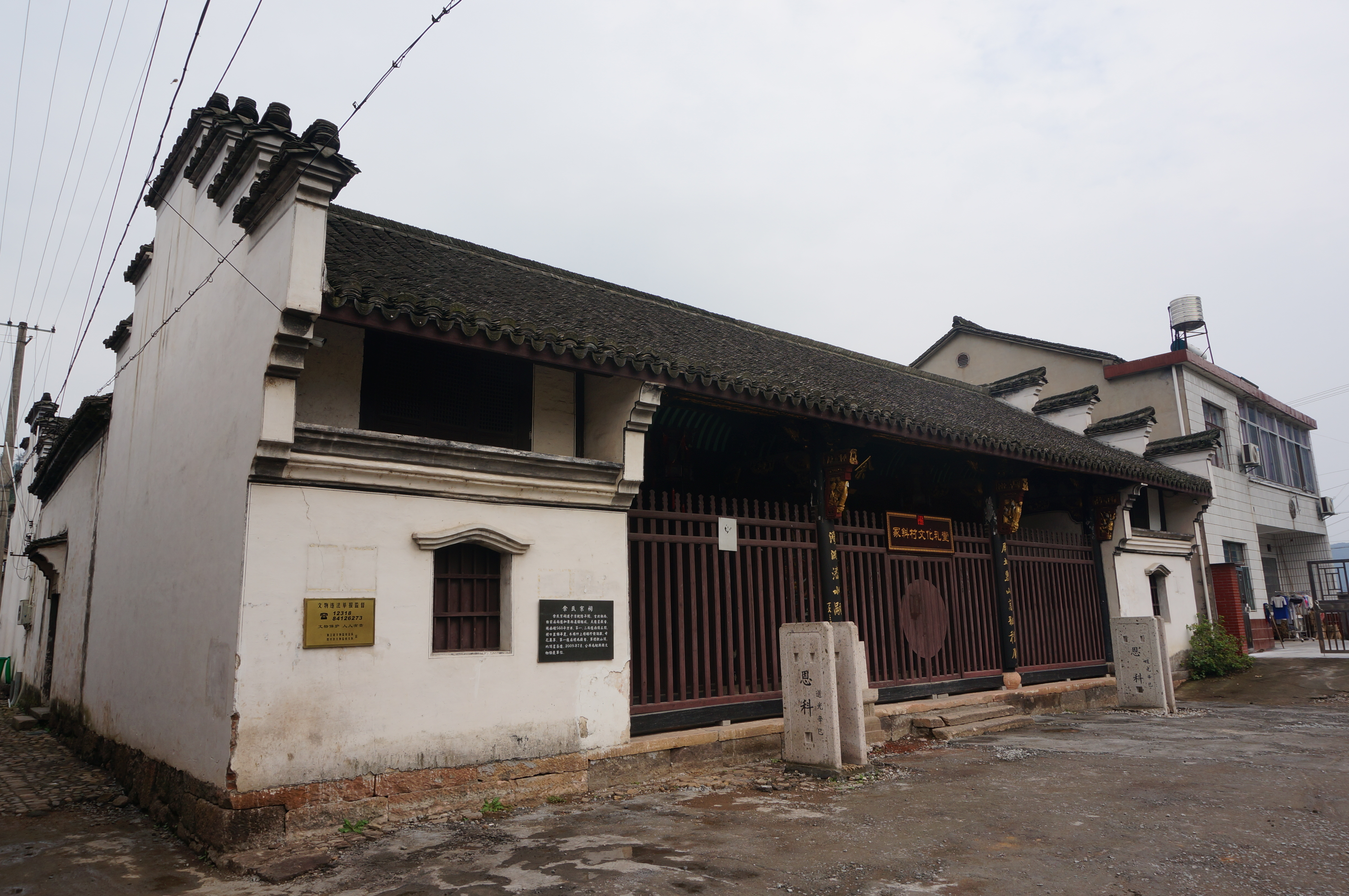 冢斜村余氏宗祠，大门。